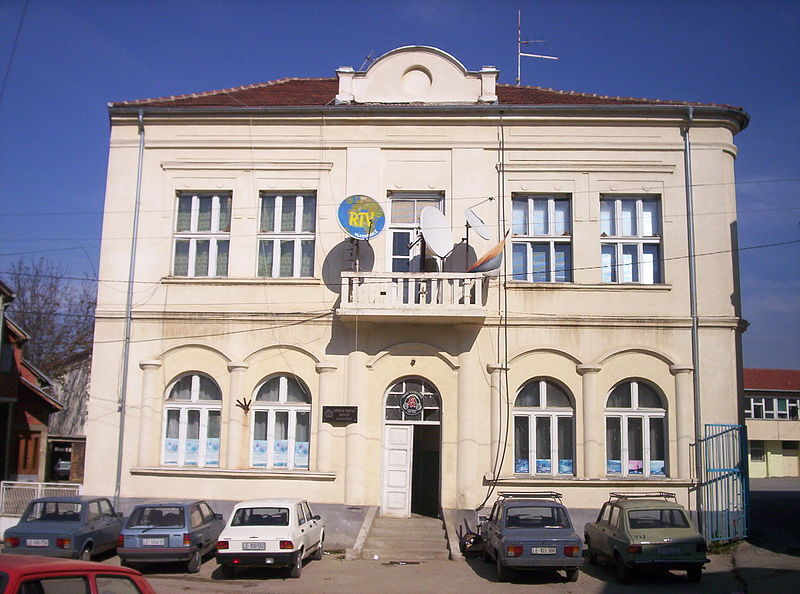 ТВ Власотинце